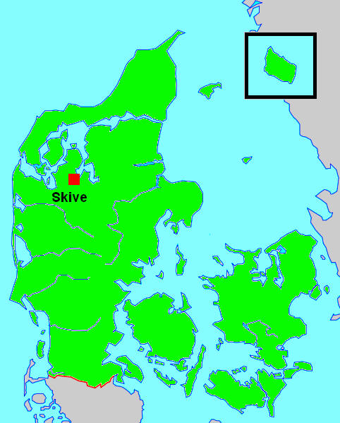 Skives beliggenhet.